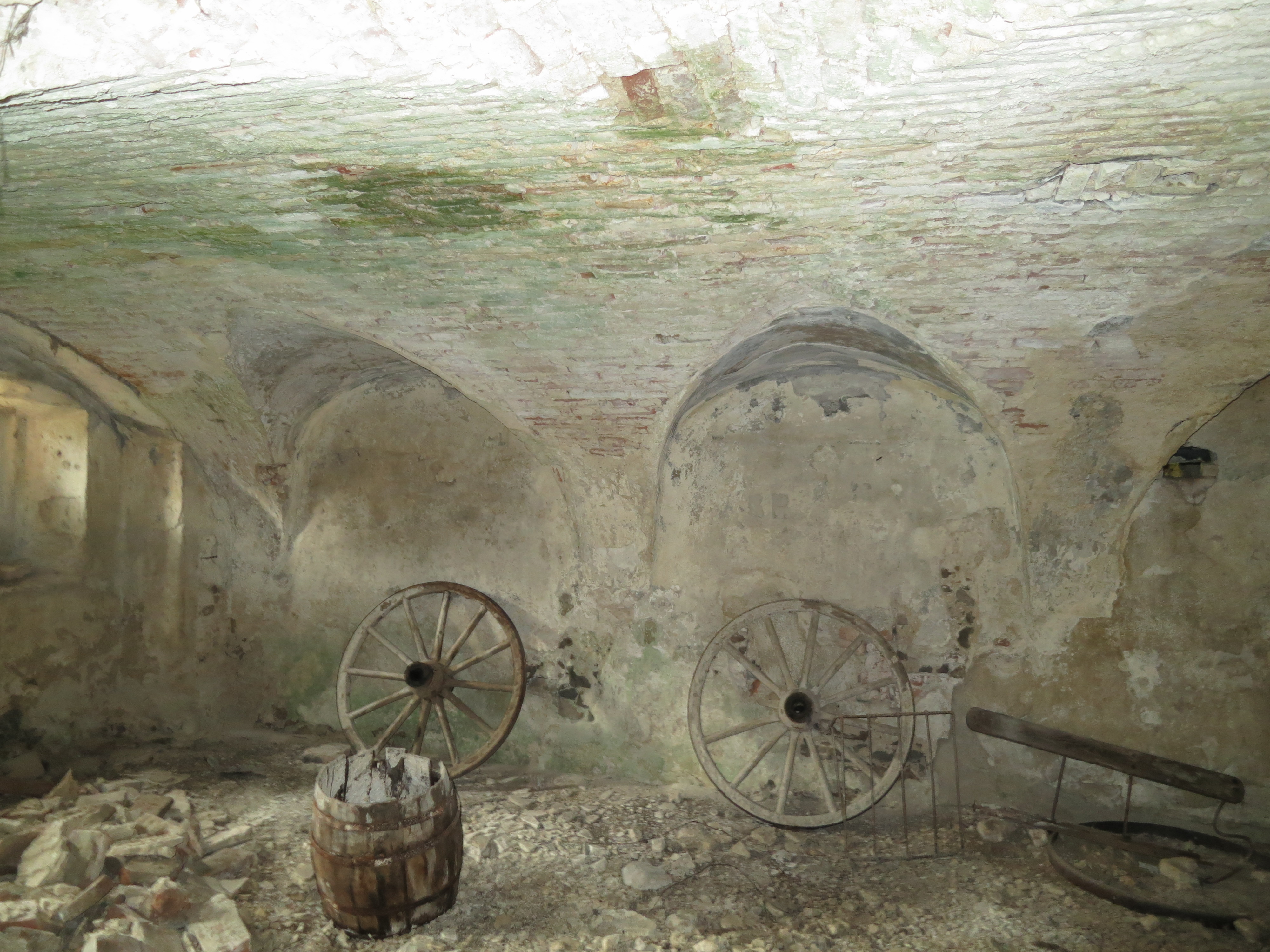 Renesanční klenba v přízemí bývalého zámku v Alinkově